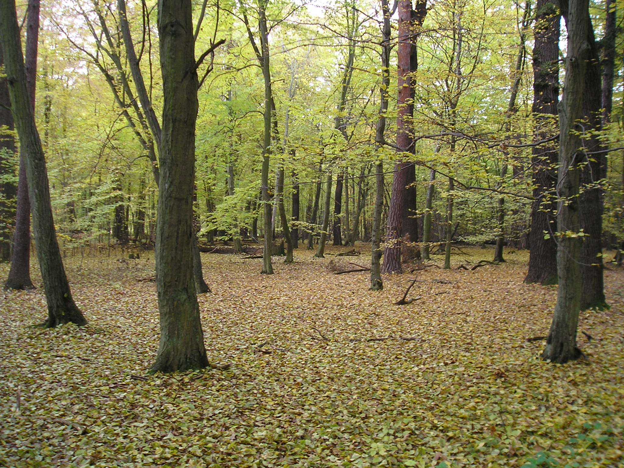 Starší dubohabrový les s dominantním kmenem borovicí lesní (Pinus sylvestris). Lesní biotop pro hajní byliny.